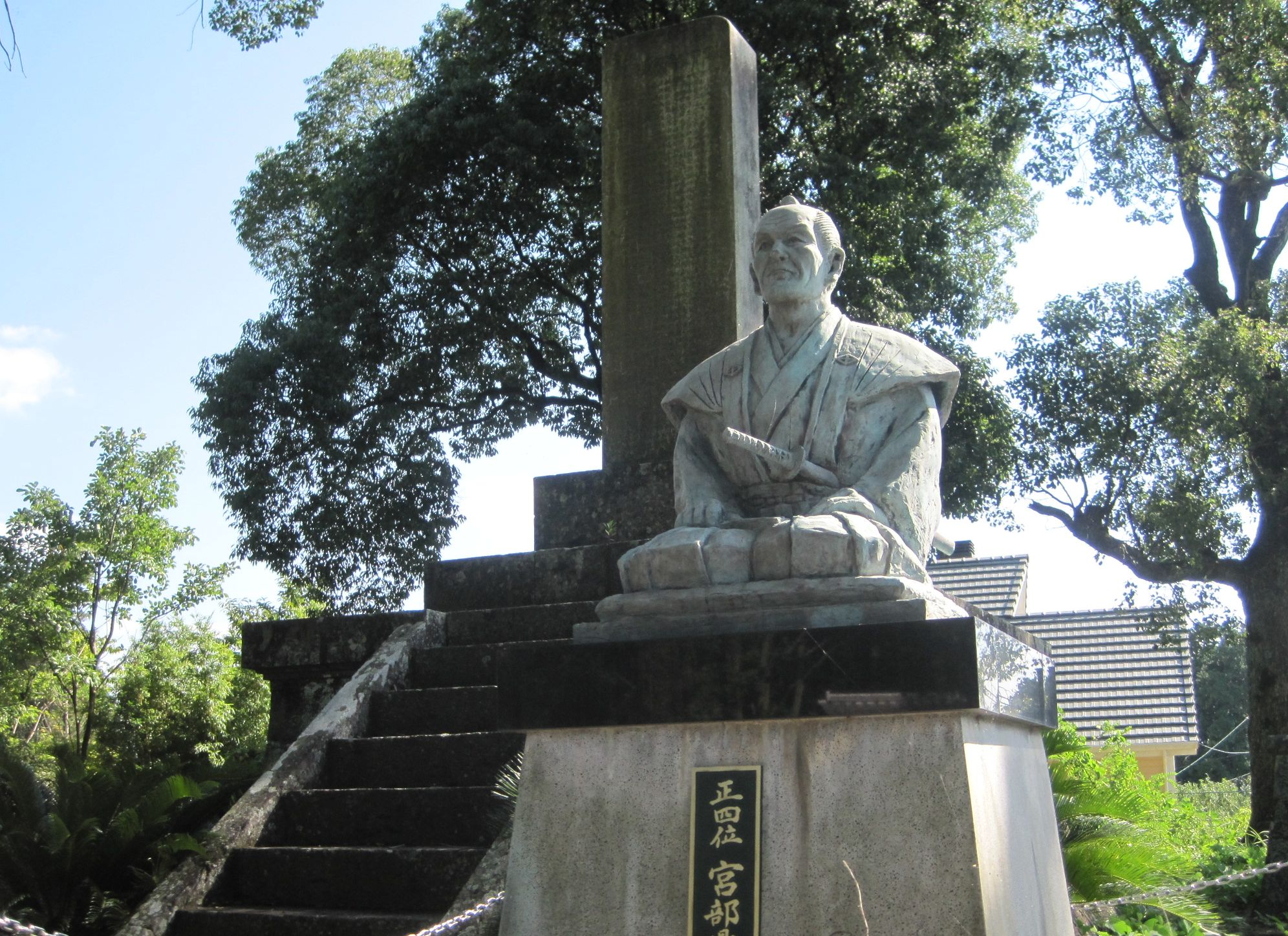 鼎春園 宮部鼎蔵の銅像